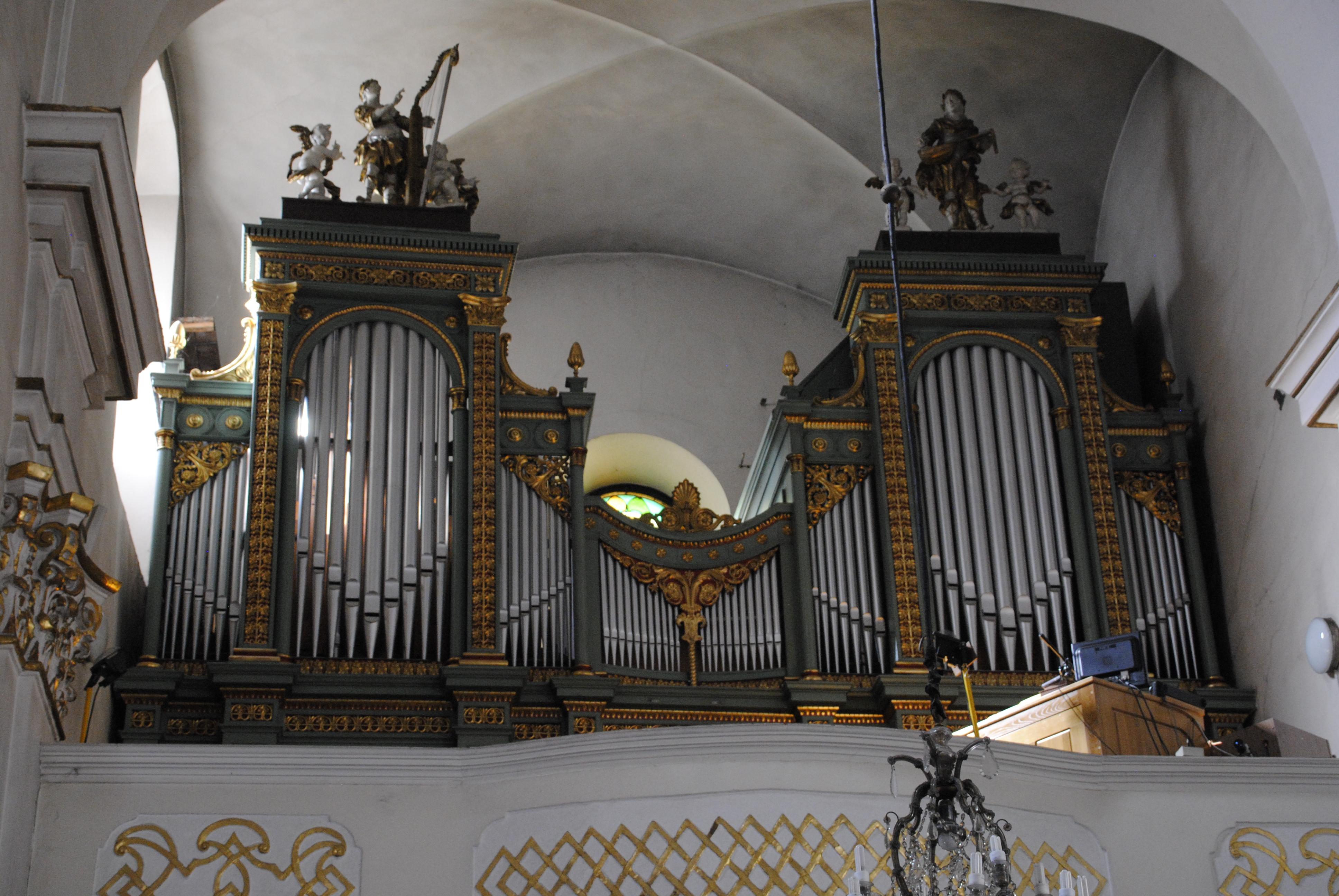 Innenraum der Kirche zur Schmerzhaften Muttergottes in Opole (Oppeln)- Orgel